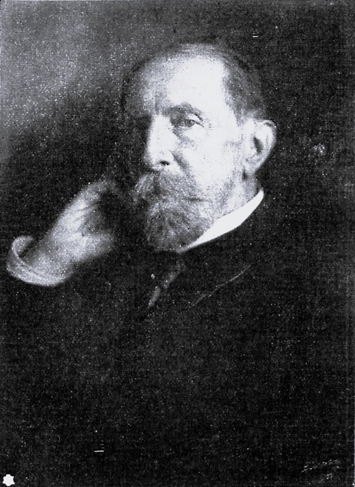 Klügmann war Hanseatischer Gesandter und bevollmächtigter Minister am Preußischen Hof, sowie Vertreter der Hansestädte im Bundesrat.